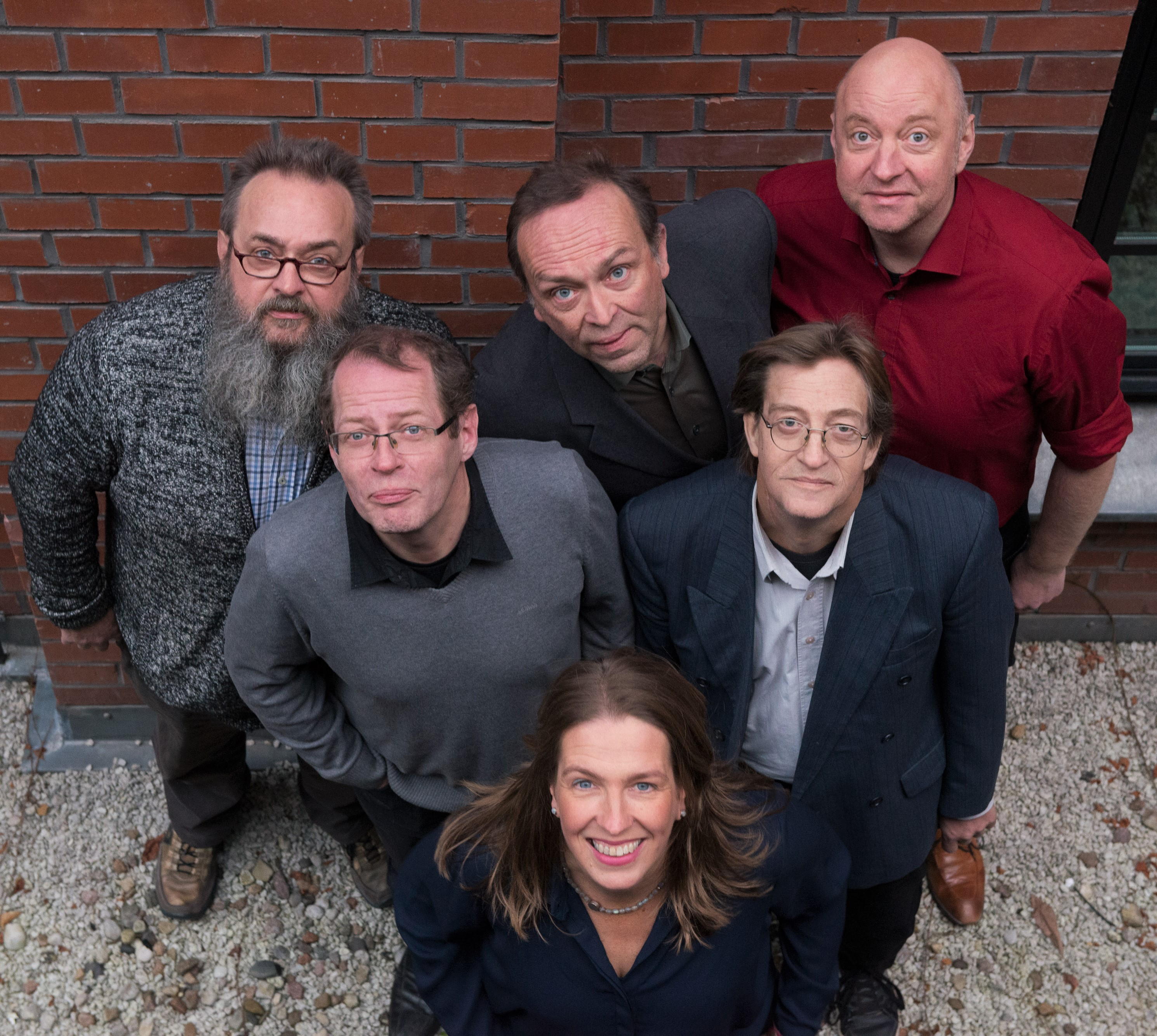 Das Frühschoppen-Team 2018